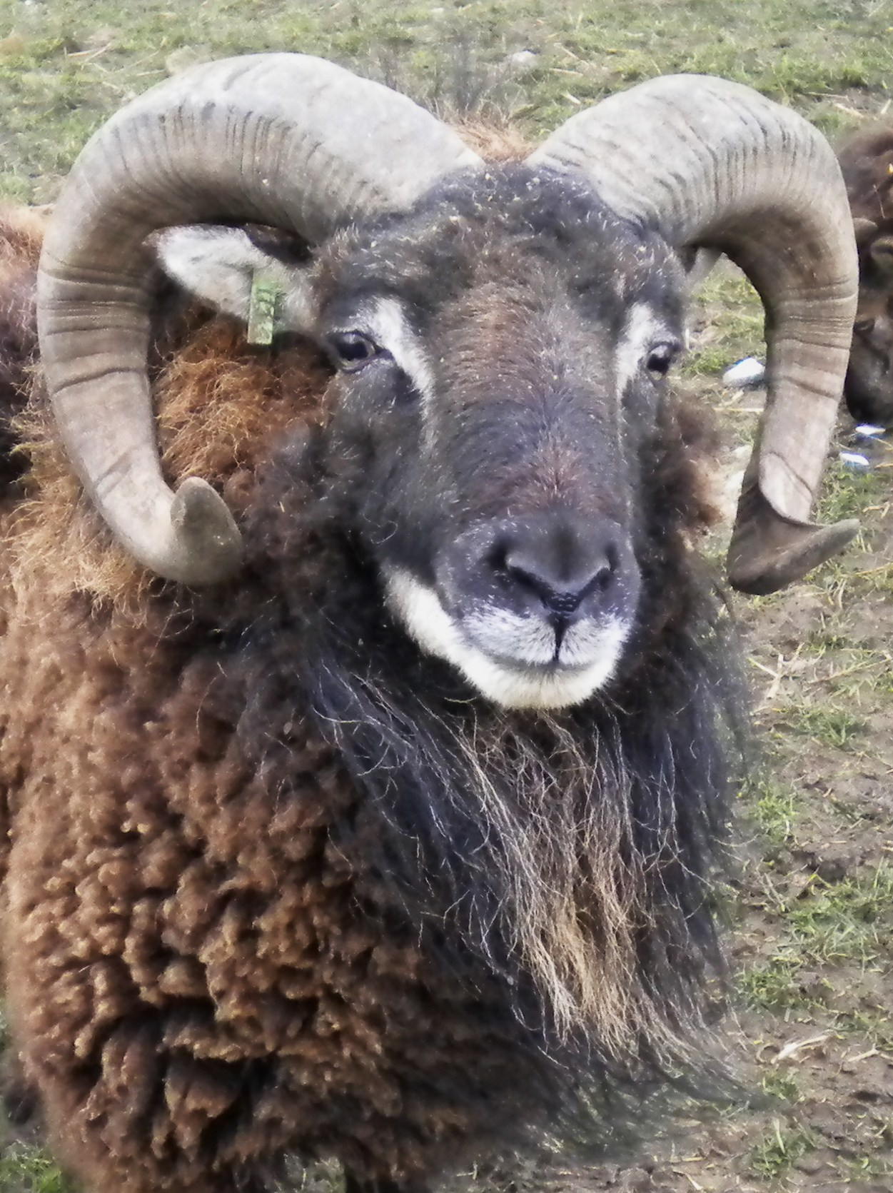 A Soay ram.